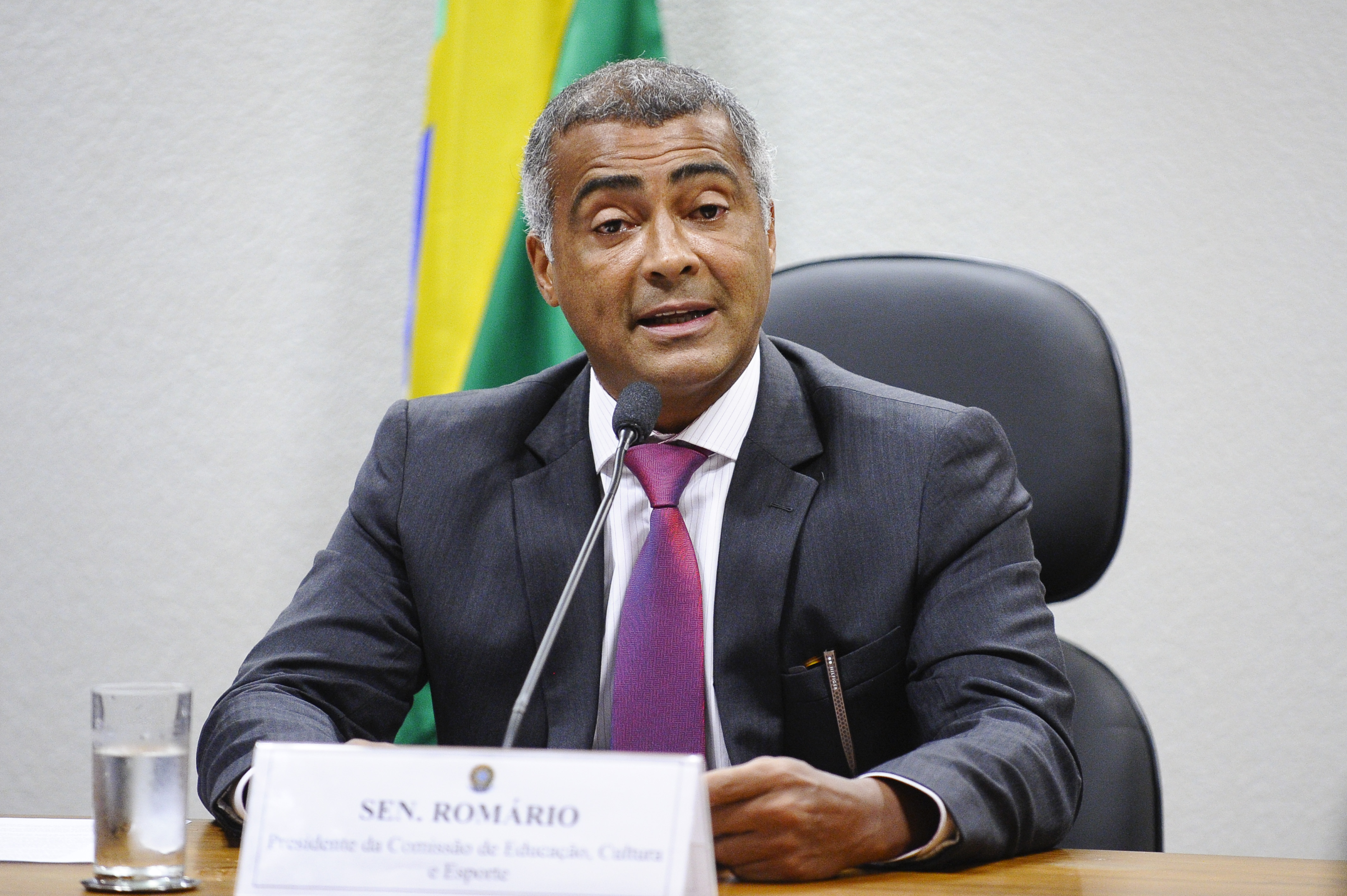 Sala de comissões do Senado durante reunião da Comissão de Educação, Cultura e Esporte (CE) para instalação dos trabalhos e eleição do presidente e vice para o biênio 2015/2016. Em pronunciamento presidente da CE, senador Romário (PSB-RJ) Foto: Edilson Rodrigues/Agência Senado